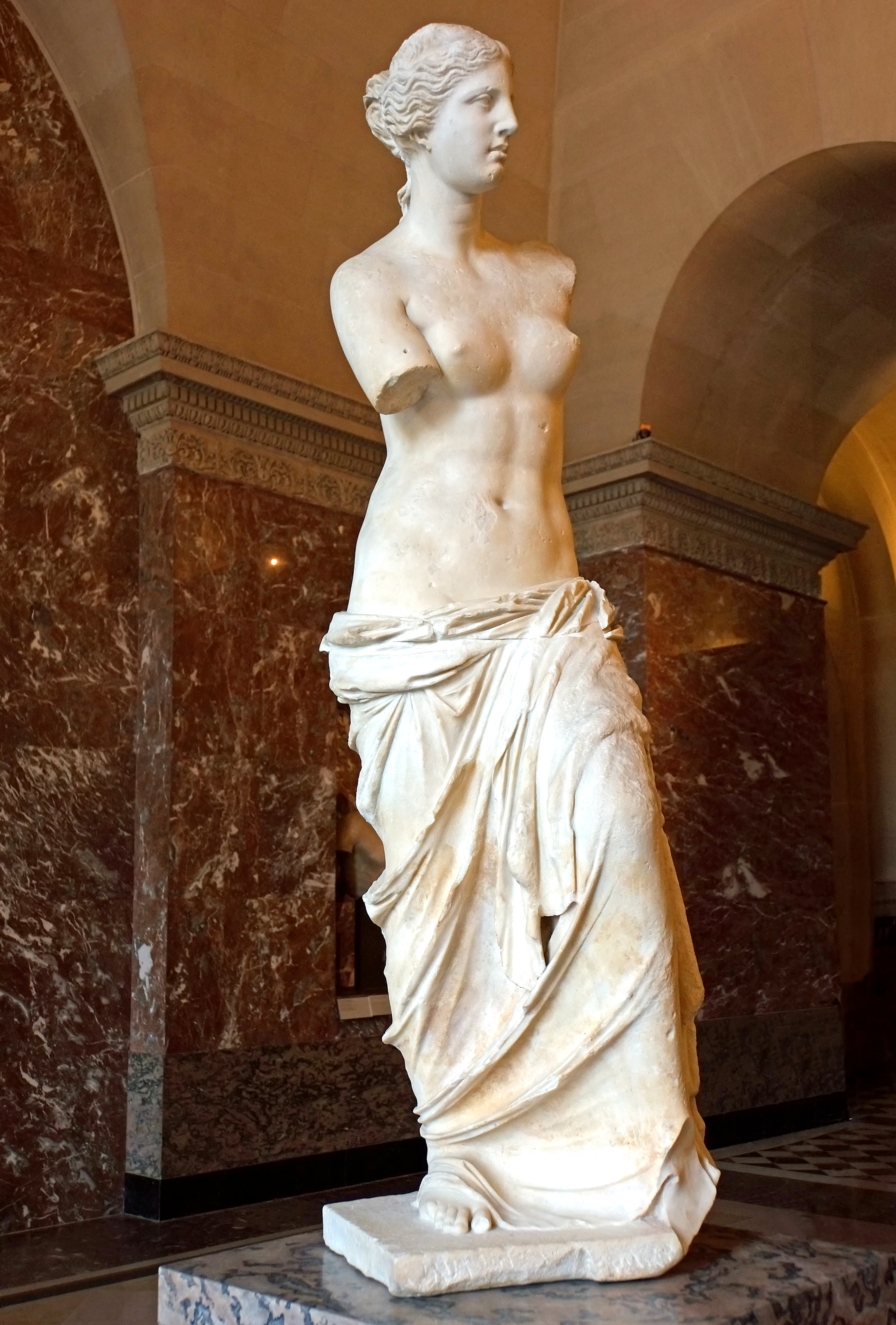 Venus de Milo